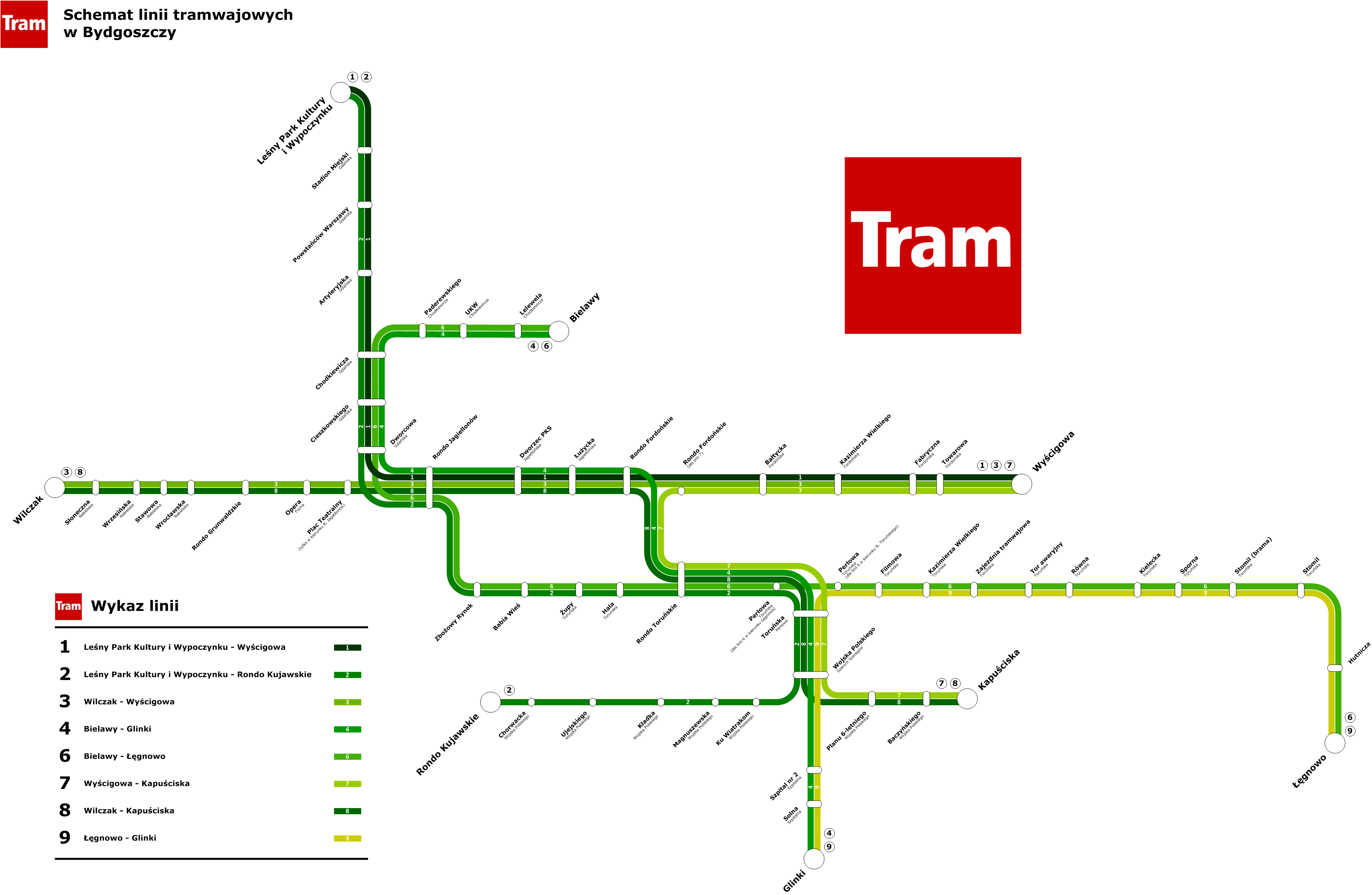 Schemat sieci komunikacji tramwajowej w Bydgoszczy